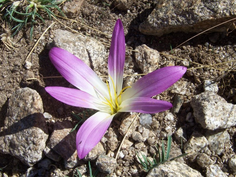 Colchicum montanum (syn. Merendera montana) (quitameriendas). La foto se sacó en Gredos